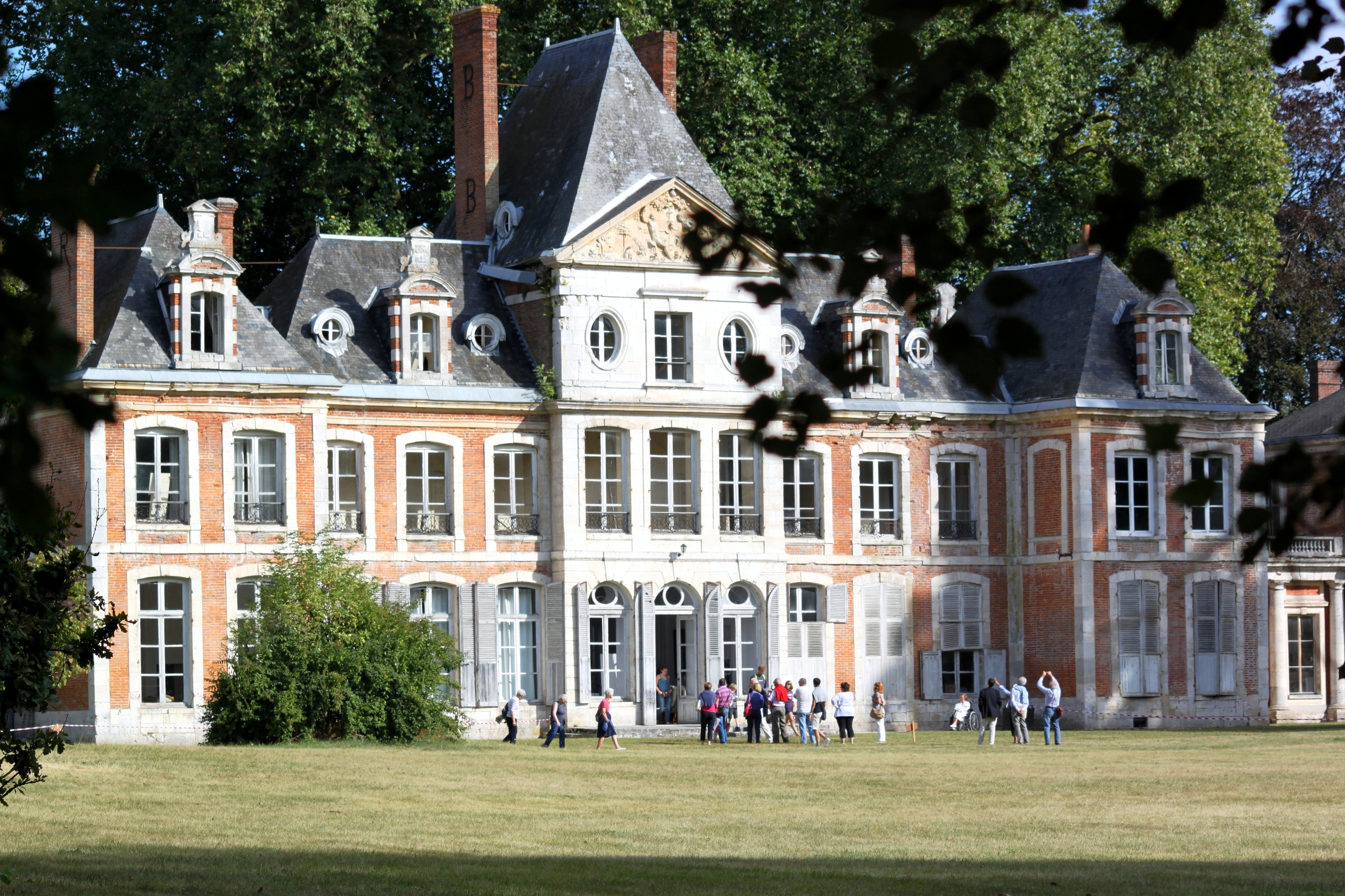 Le château de Pinterville, Eure